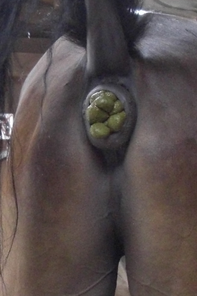 Äppelndes Pferd